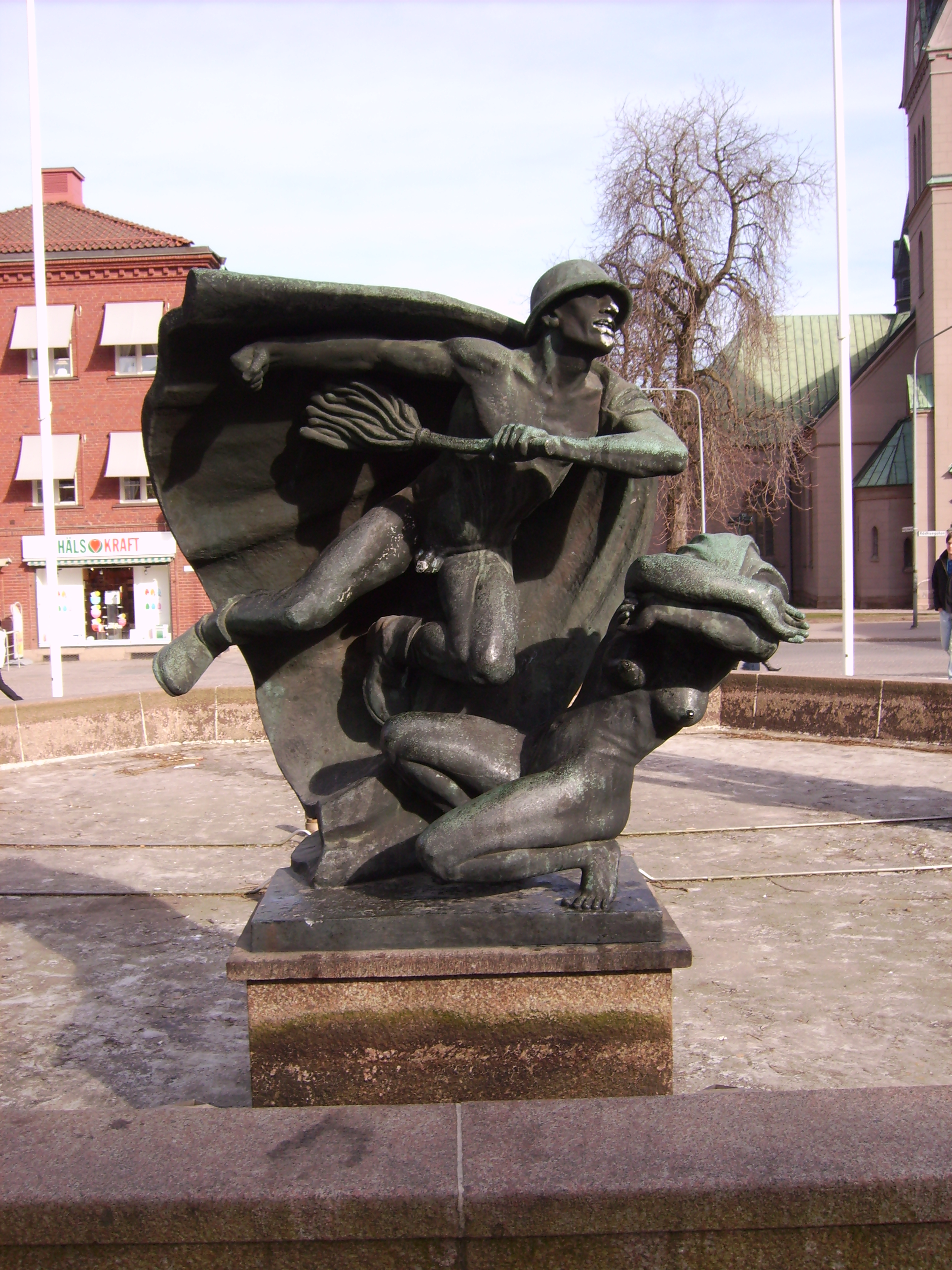 Bilden är fotograferad av Harri Blomberg. Photo by Harri Blomberg.